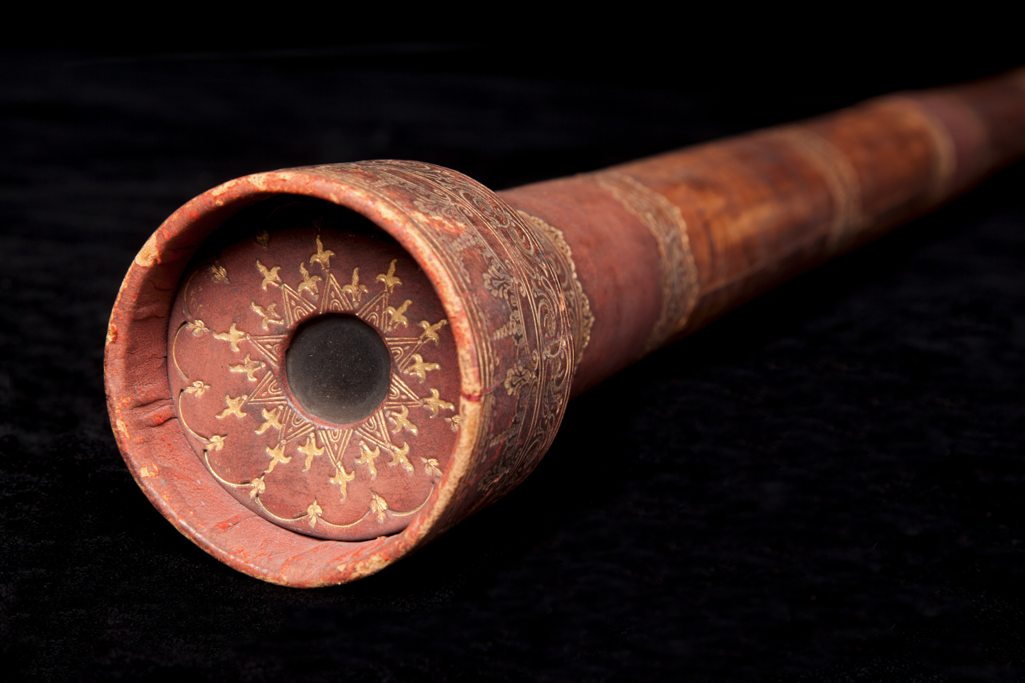 Cannocchiale galileiano, riproduzione di uno dei cannocchiali di Galileo, sec. XX. Museo nazionale della scienza e della tecnologia Leonardo da Vinci, Milano.